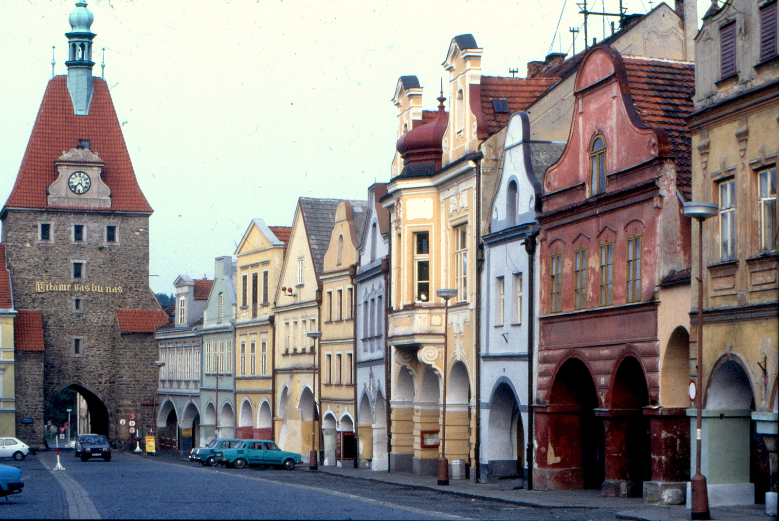 Domažlice, diapozitiv z r.1990